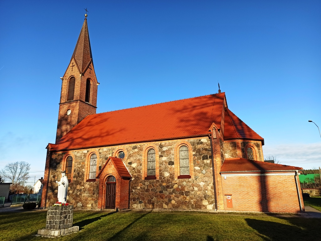 Trzemeszno Lubuskie - kościół, 2020 rok